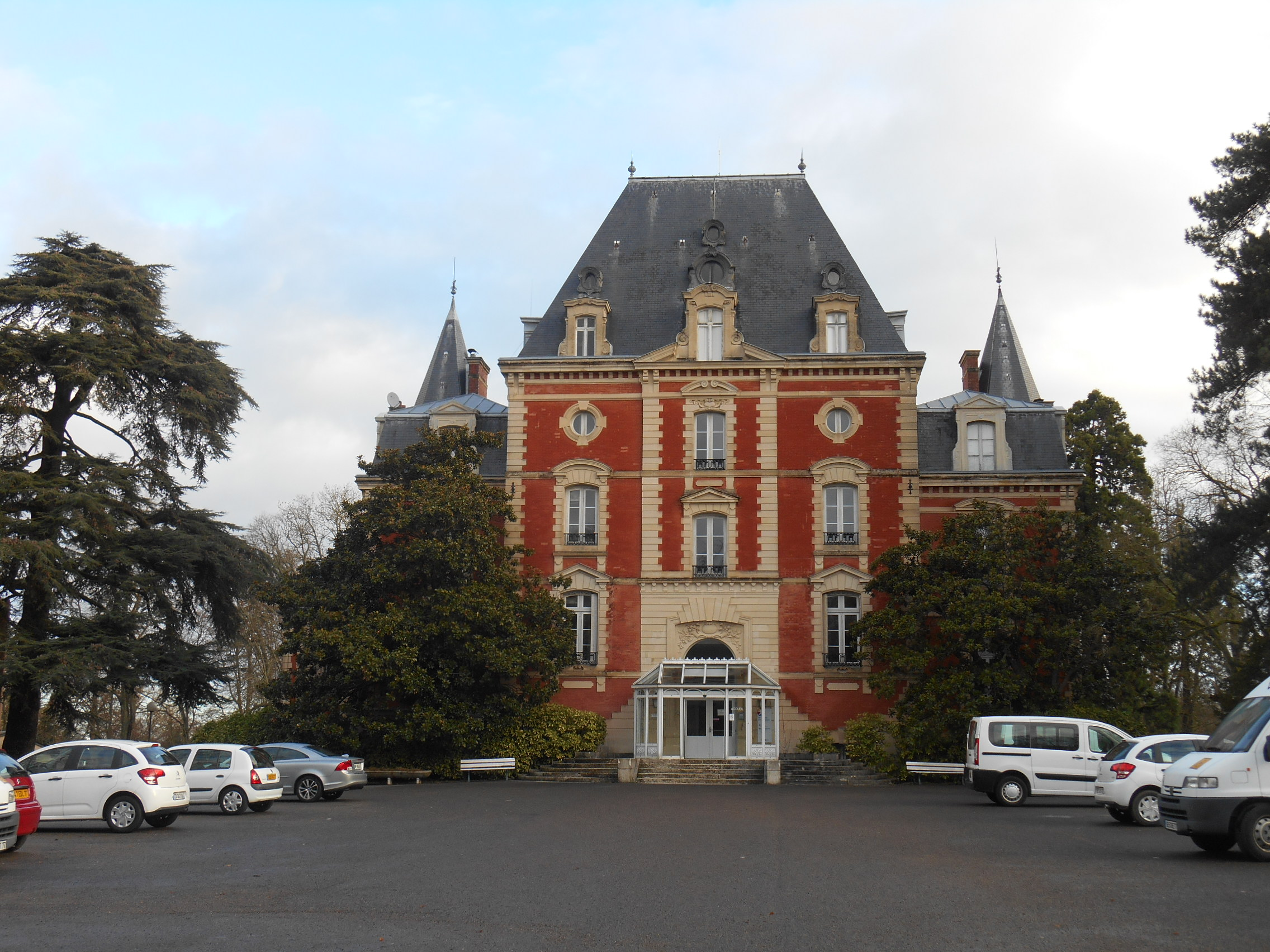 Château de Brolles, à Bois le Roi (77)